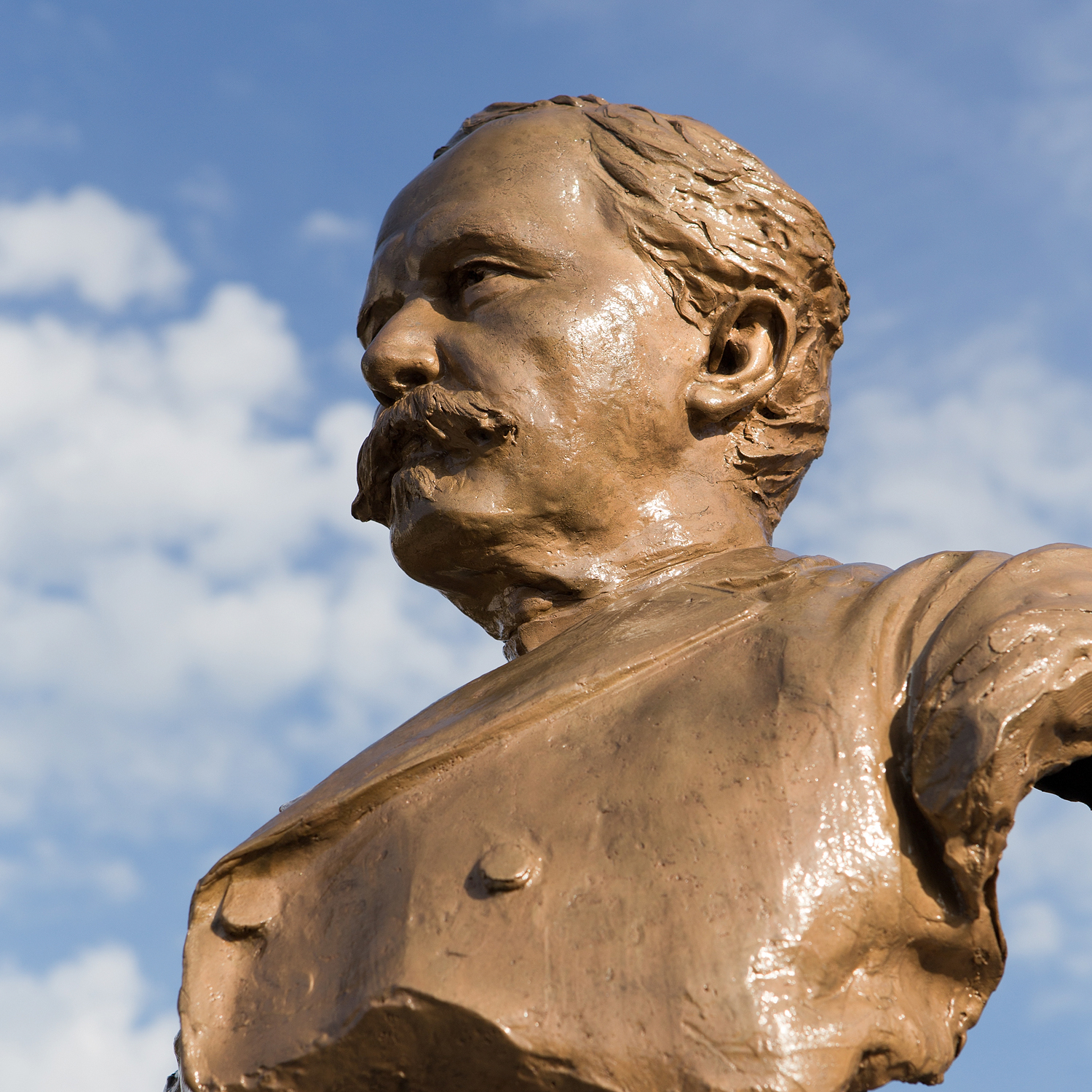 Büste des Nationalrats Casimir Folletête unweit der alten Kirche Saint-Hubert in Le Noirmont (JU)